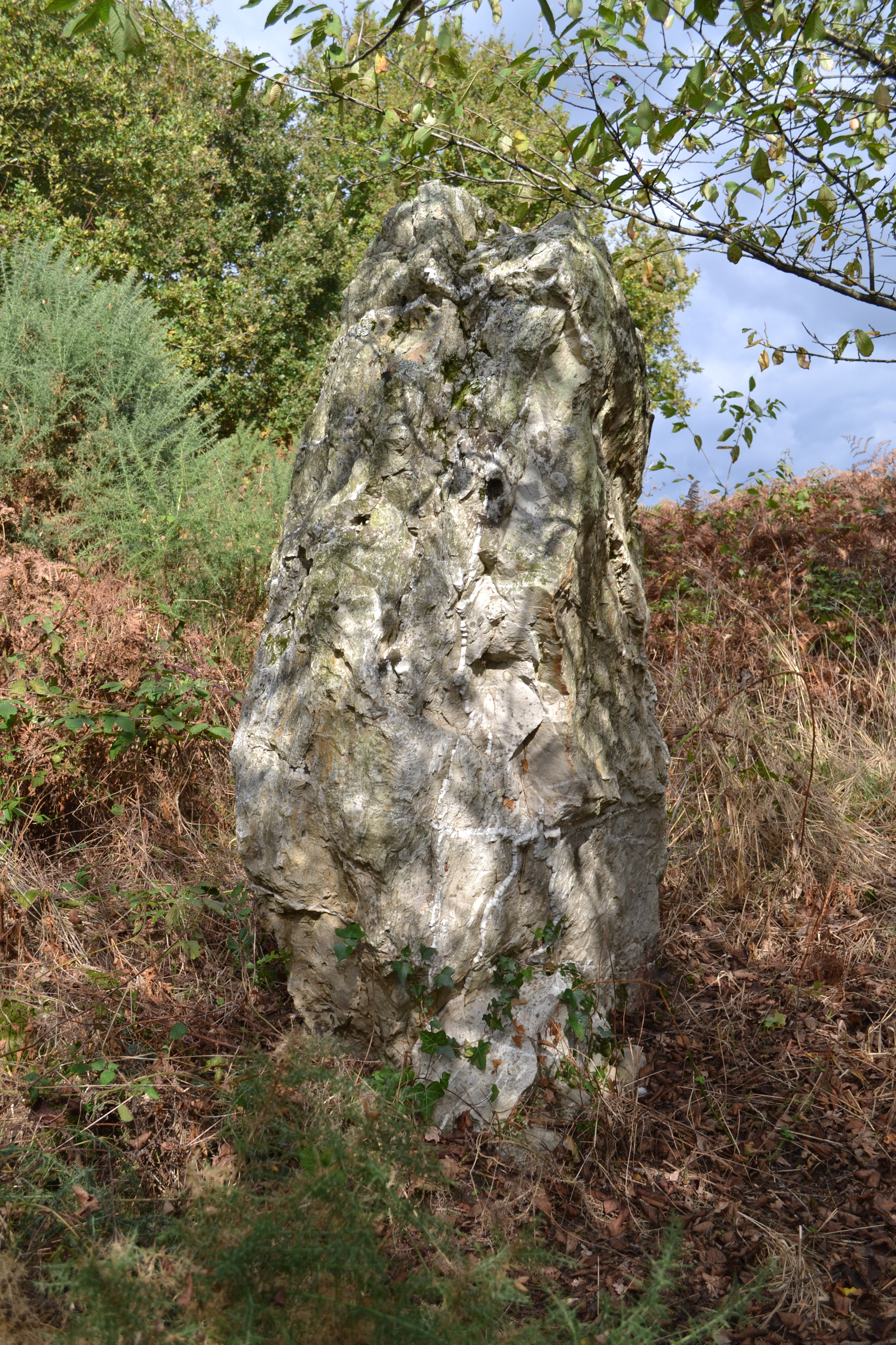 Menhir des Cohardais, Lusanger.